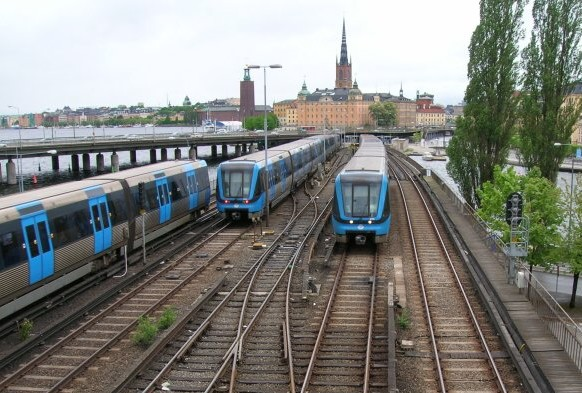 Stockholm Subway at Söderström and Slussen, Stockholm, Sweden.